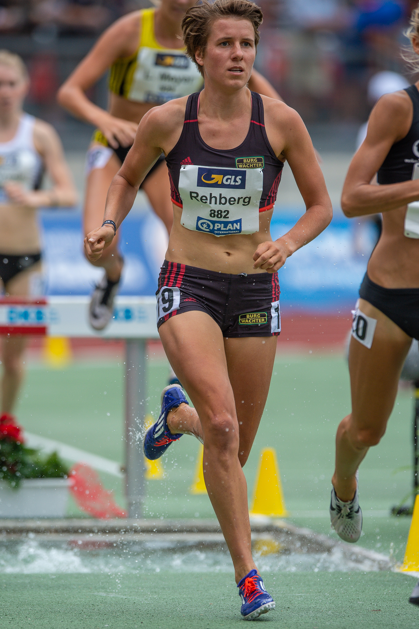 3000 Meter Hindernislauf,DLV,Deutsche Leichtathletik Meisterschaften 2018,Deutscher Leichtathletik-Verband,Max-Morlock-Stadion,Maya Rehberg,SG TSV Kronshagen/Kieler TB,Steeplechase